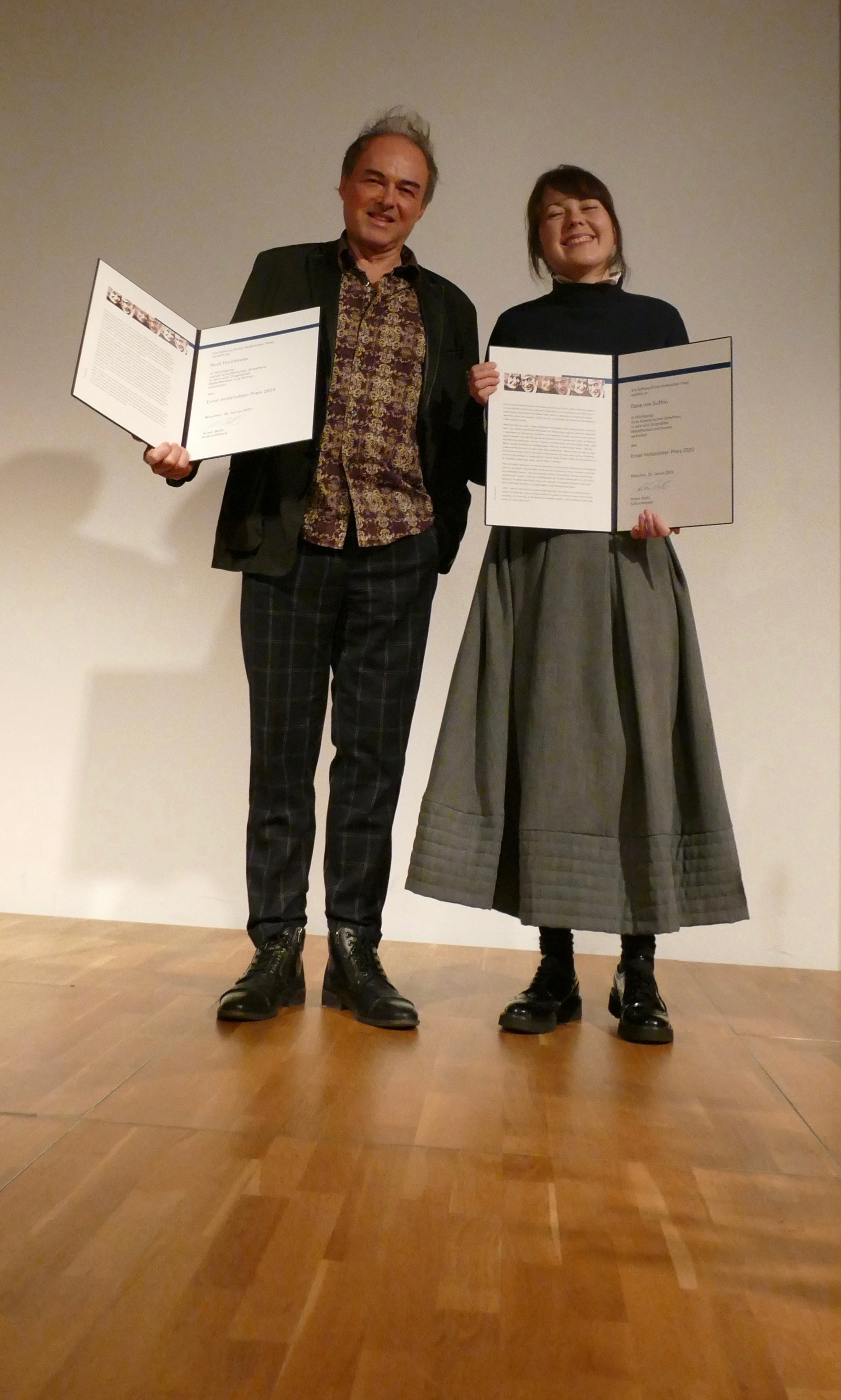 Der Maler, Cartoonist und Autor Rudi Hurzlmeier und die Schriftstellerin Dana von Suffrin erhalten den Ernst Hoferichter-Preis 2020